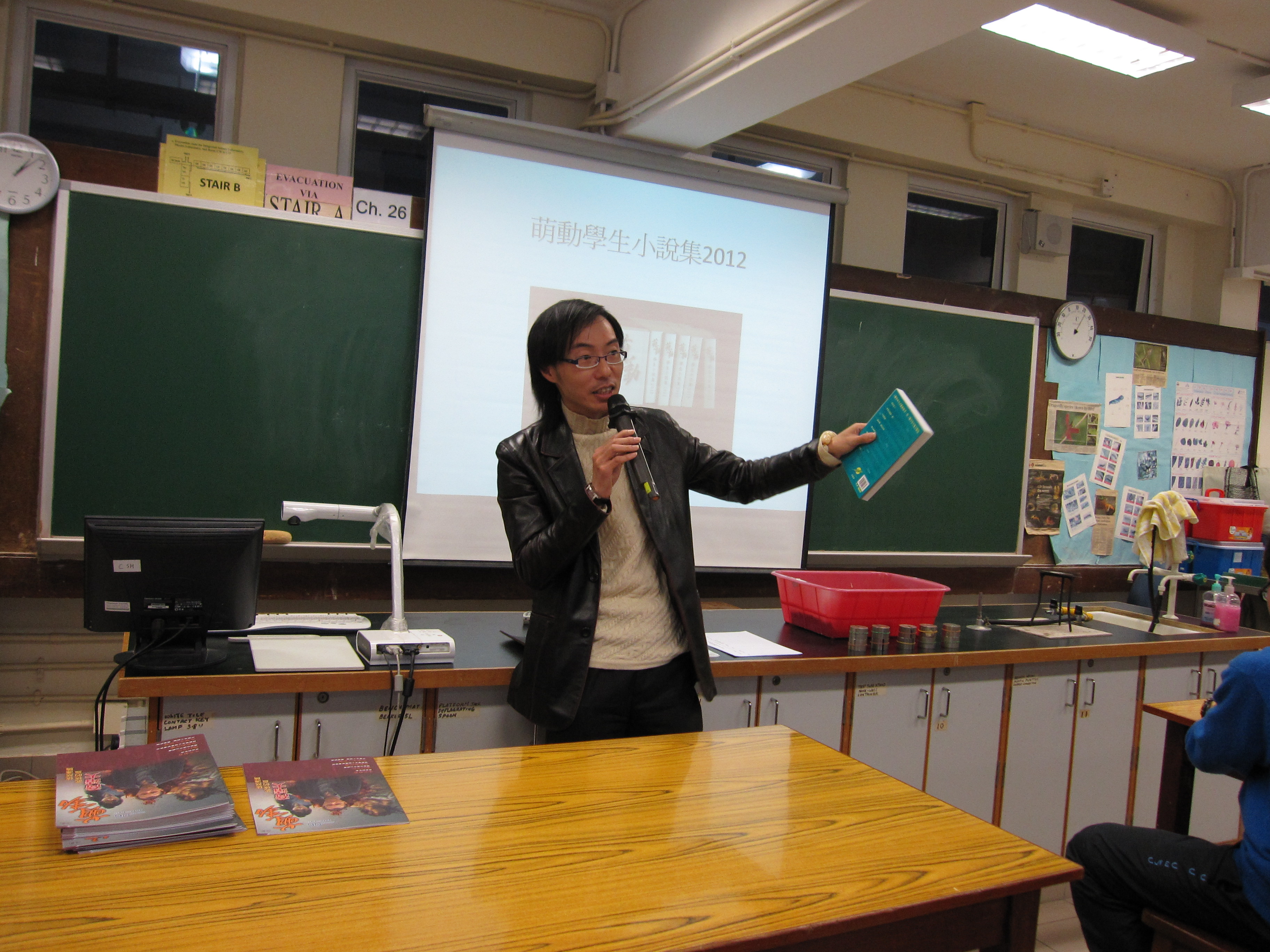 黃獎為學生講述創作的要訣